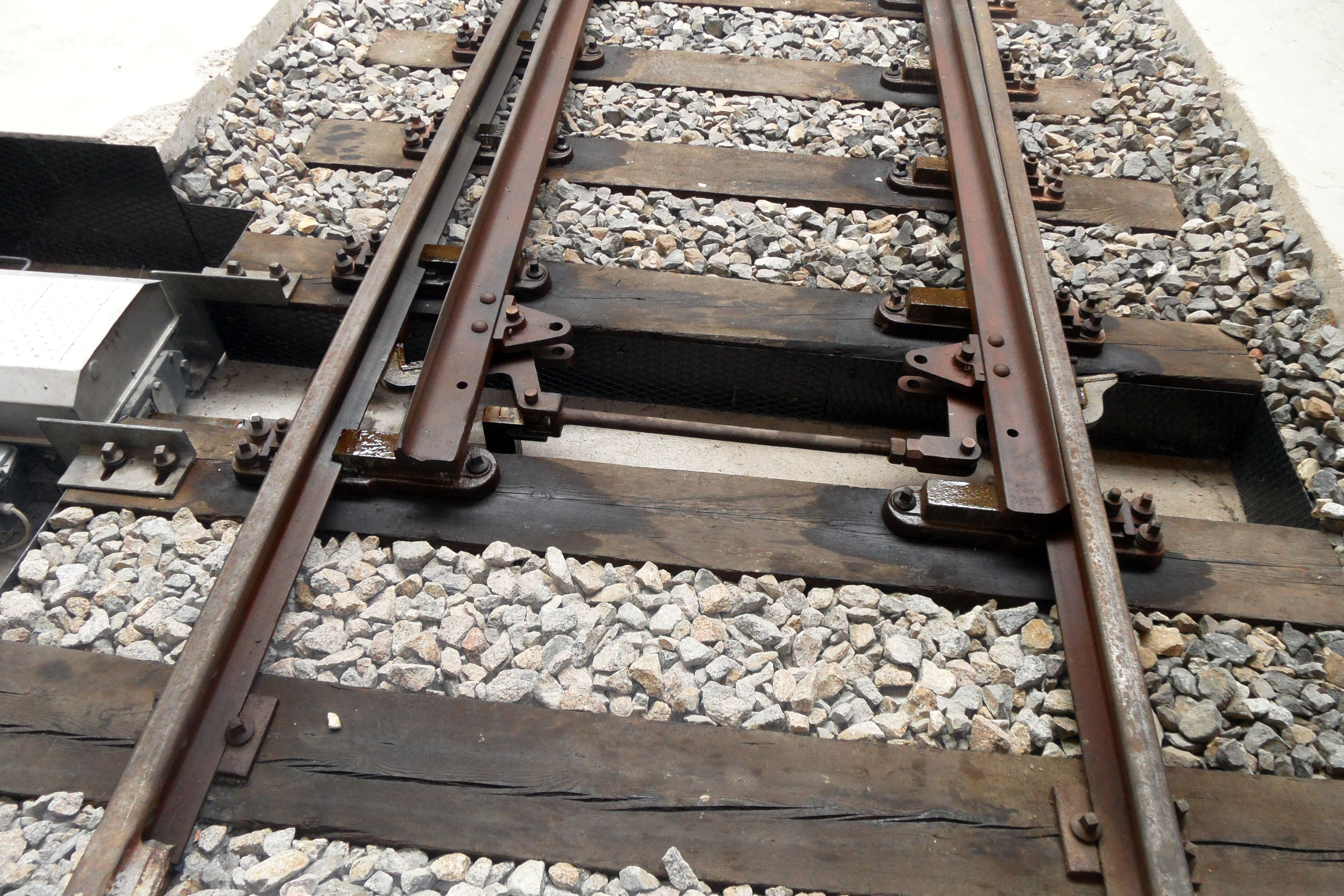 Der Hakenspitzenverschluss dürfte wie der Rest der Zungenvorichtung aus den 1920ern stammen, nur der Antrieb ist etwas jünger. Hakenschlösser waren im alten Österreich die Regelbauart.